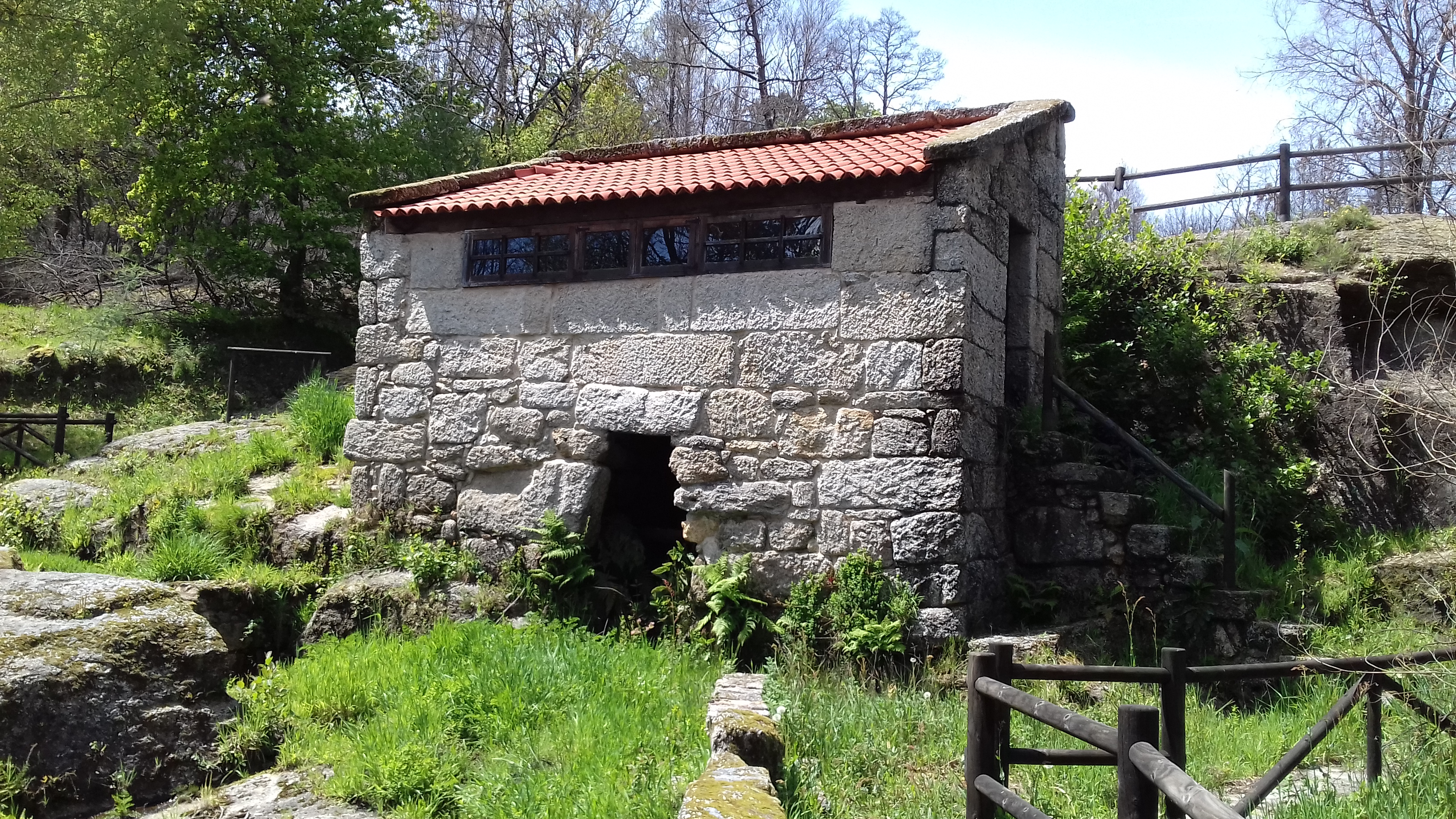 Muíño en Vilar de Condes, Carballeda de Avia